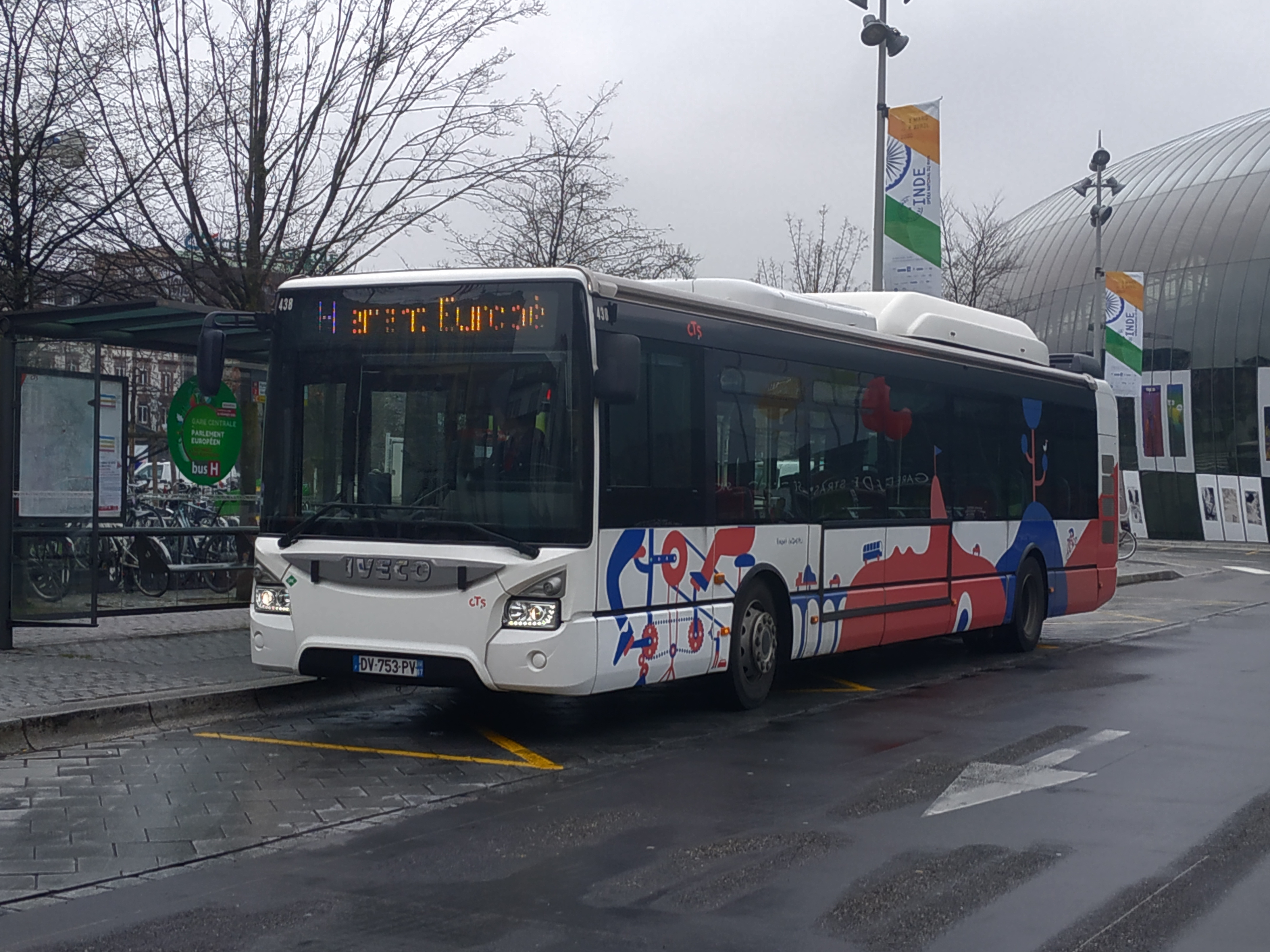 Iveco Urbanway 12 CNG n° 438 circulant sur la ligne H de Strasbourg le jour de l'inauguration de la ligne en février 2020, en attendant la livraison de la quantité suffisante de véhicules "Alstom Aptis".